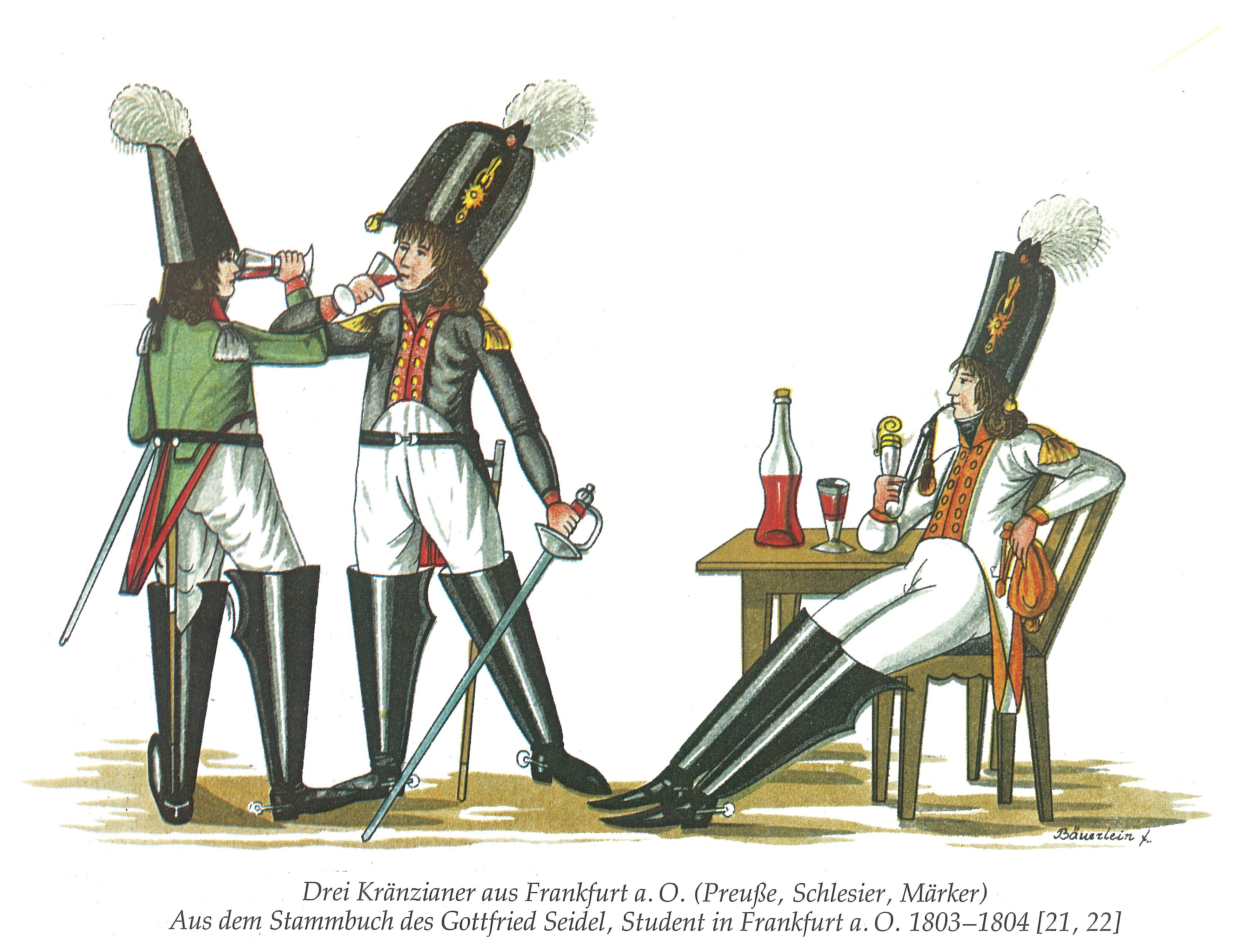 Kränzianer